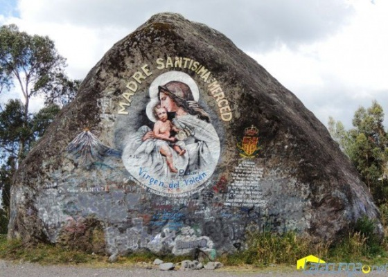 Lugar turistico situado en Mulalo